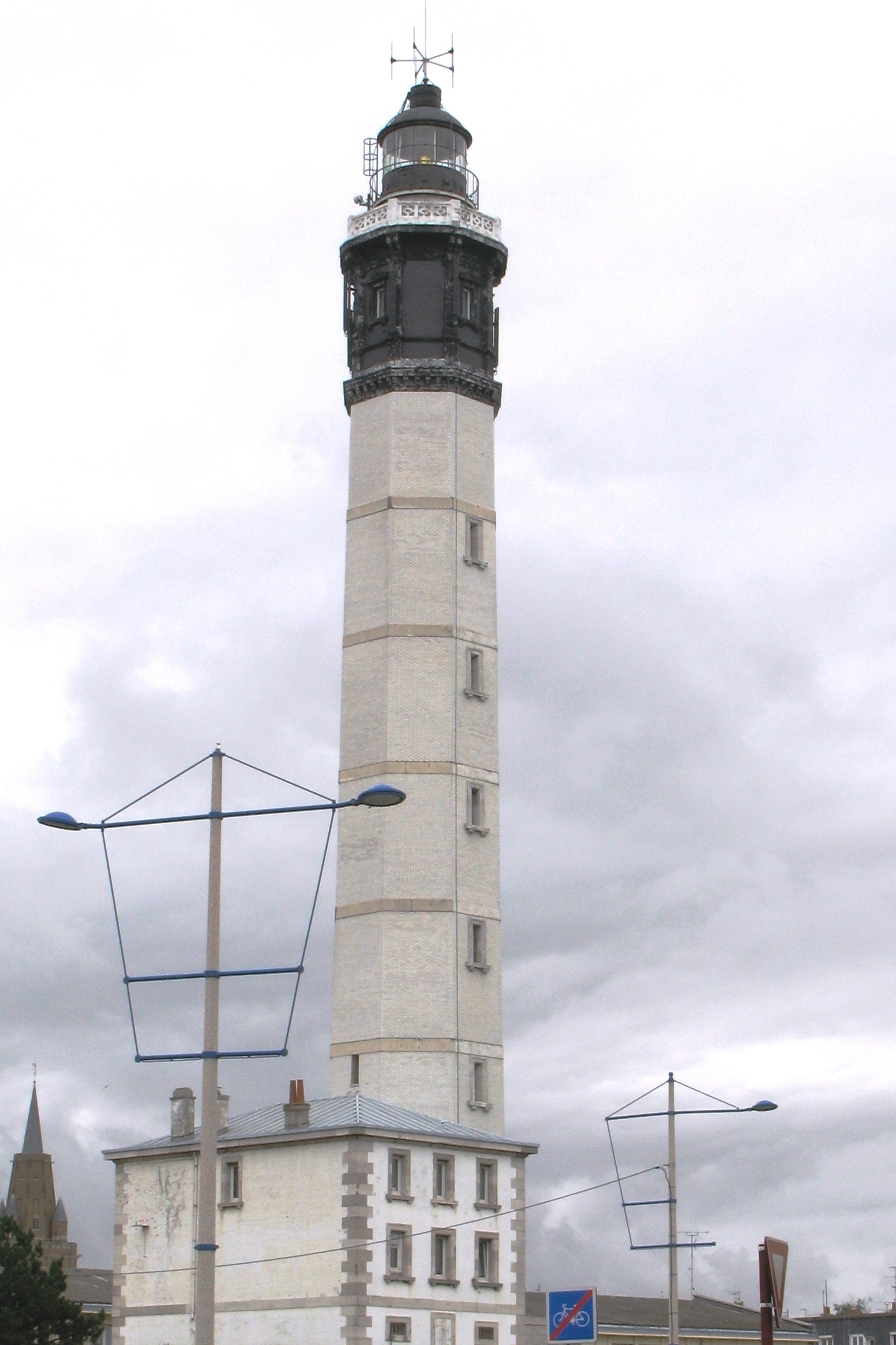 De Liichttuerm vu Calais de 17. August 2008. Kategorie:Liichttierm a Frankräich